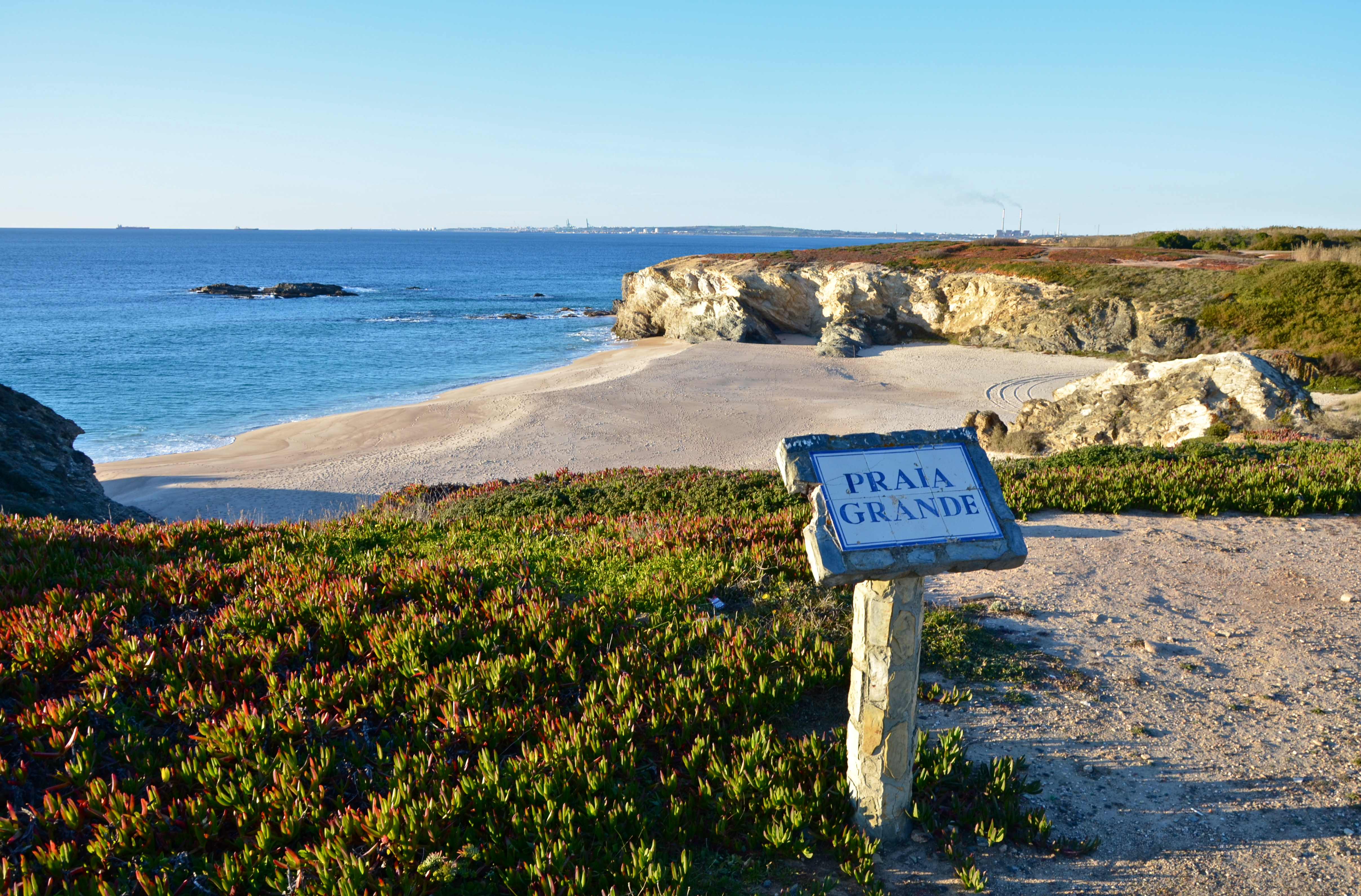 Praia Grande